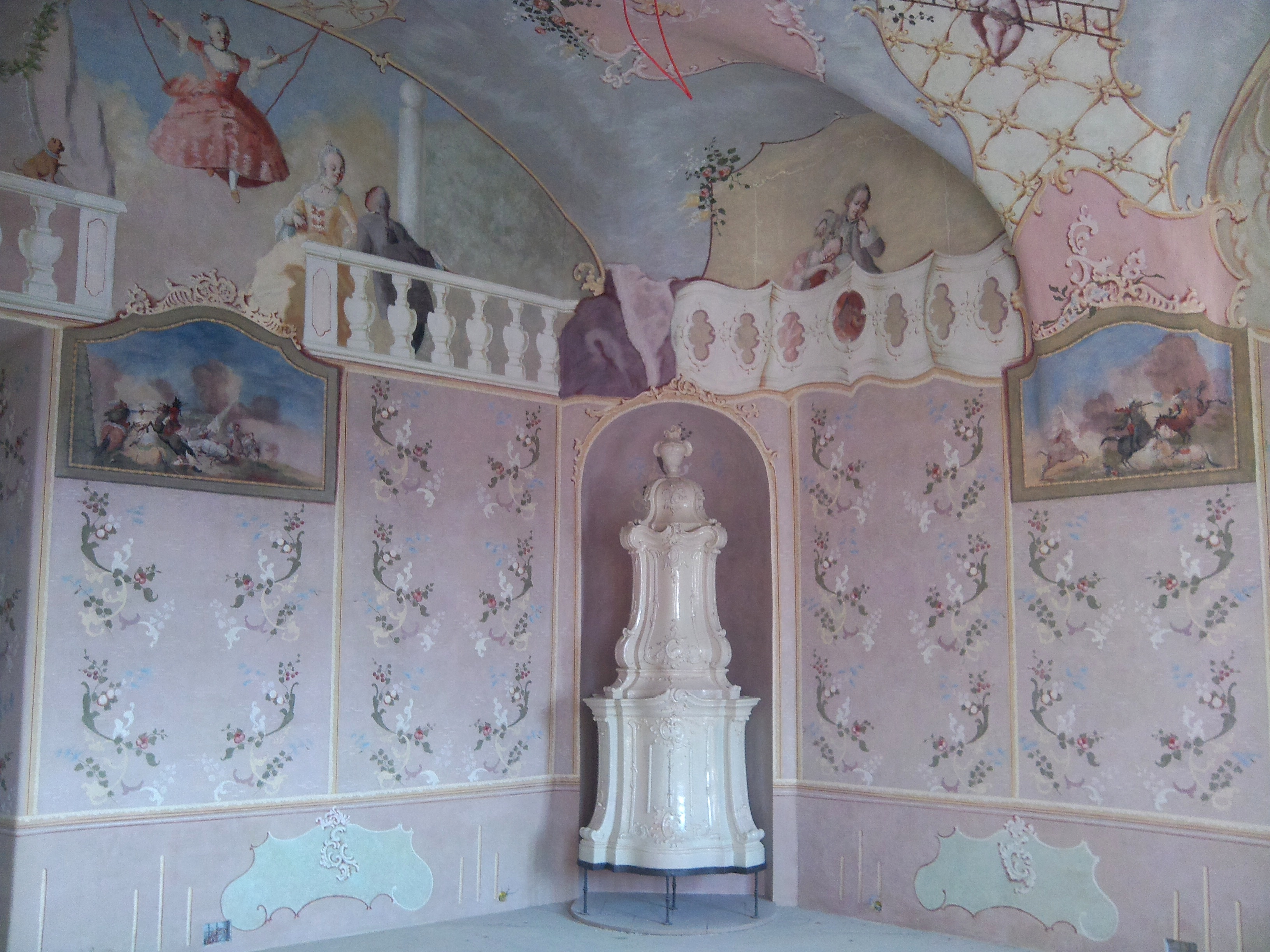 L’Huillier-Coburg-kastély freskói This is a photo of a monument in Hungary. Identifier: 2726